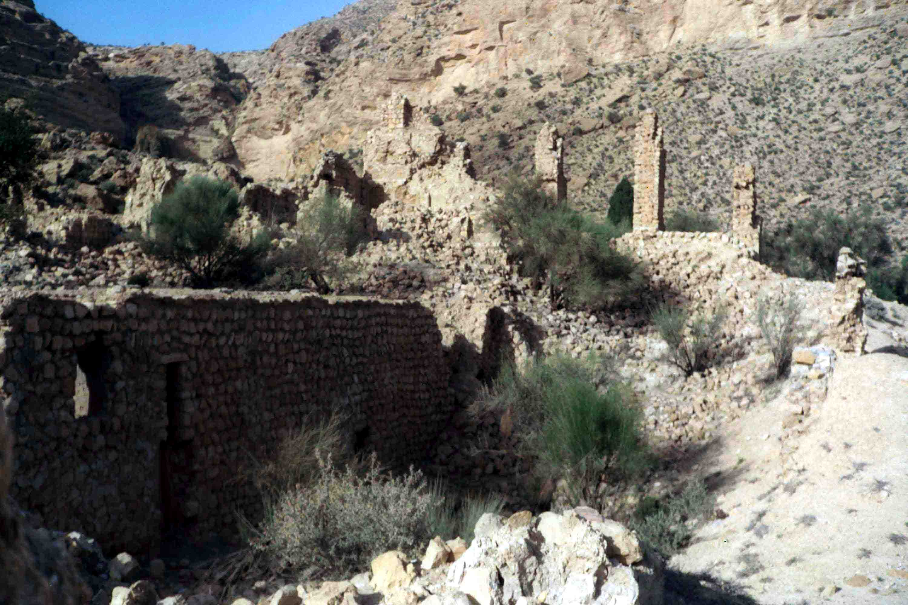 کاخ کيقباد رحمت آباد جویم